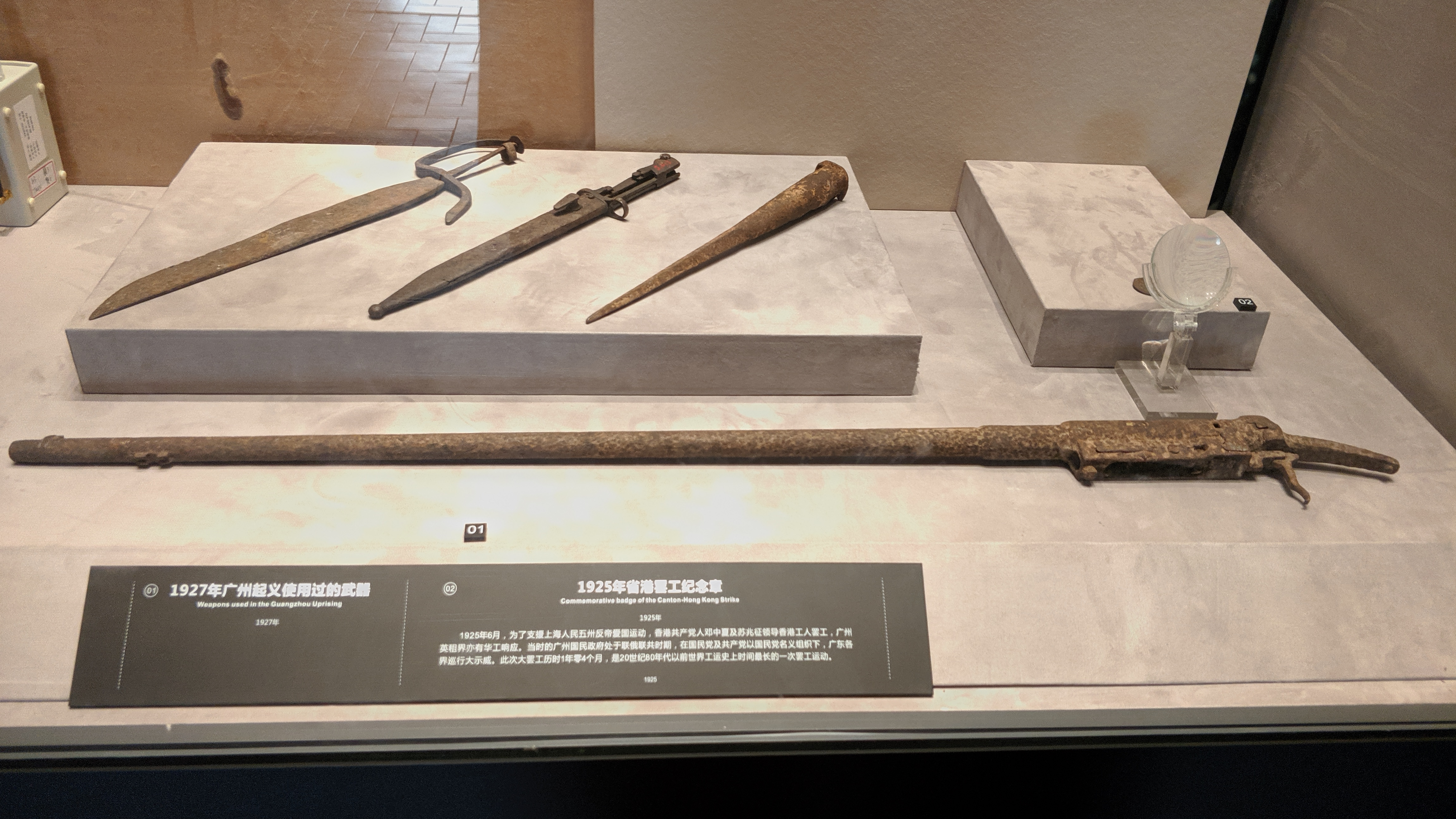 广州博物馆馆藏_广州起义以及省港大罢工时所使用的武器